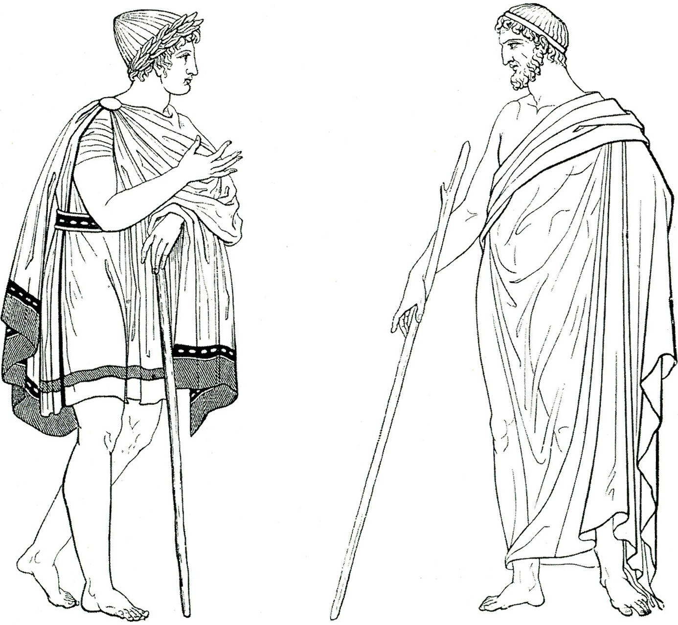 Ιάκωβος Φάλκε. Ελλάς, ο Βίος των Αρχαίων Ελλήνων. Κατά το γερμανικό του Ιακώβου Φάλκε, Ν. Γ. Πολίτης (μετ.), Αθήνα, Κάρολος Βίλμπεργκ, 1887